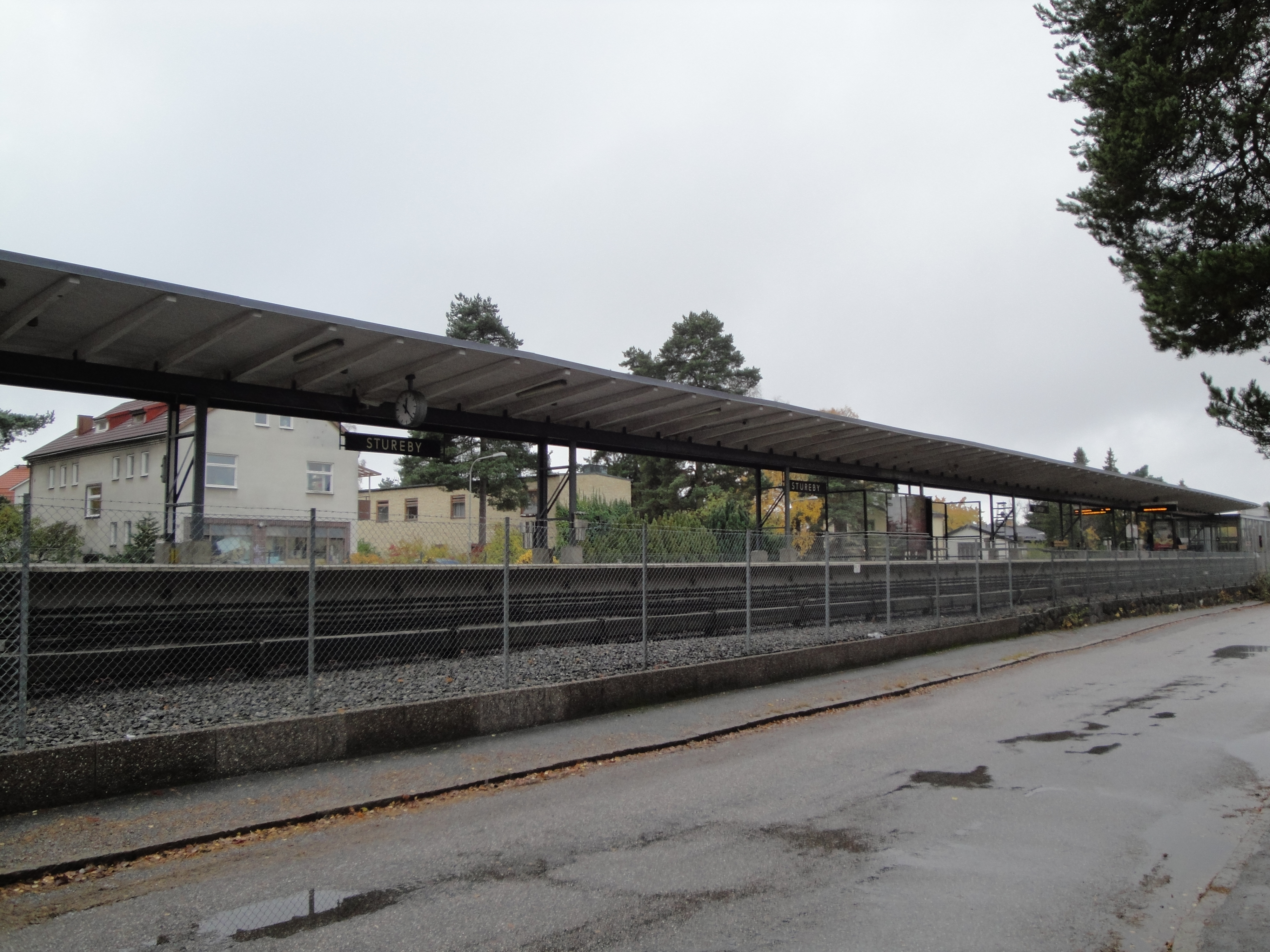 Tunnelbanestationen i Stureby.